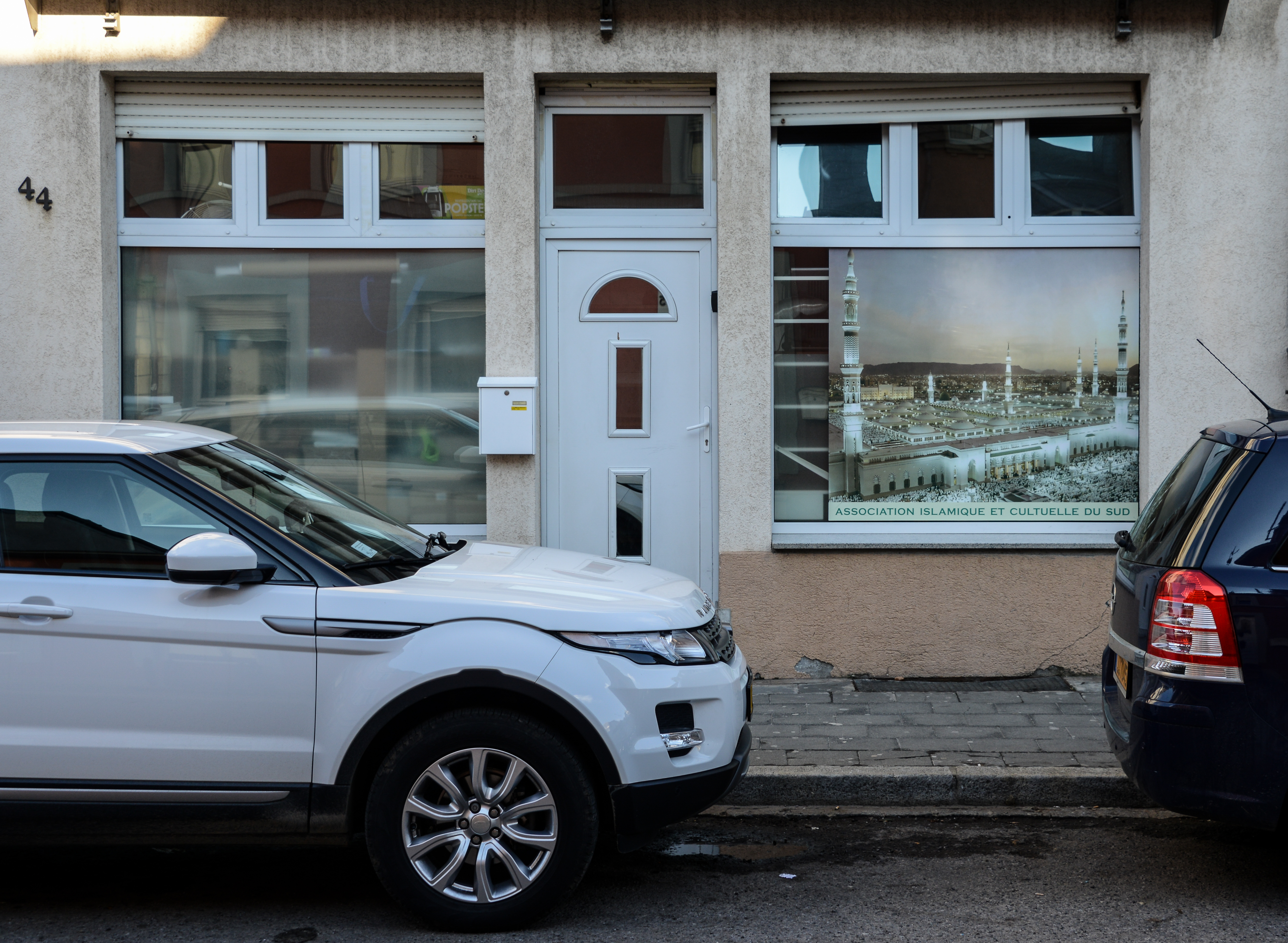 D'Moschee vun der «Association islamique et culturelle du sud», op Nr 44, Lëtzebuergerstrooss zu Esch.